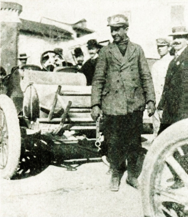 Ferdinando Minoia vainqueur de la Coppa Florio 1908, sur Isotta-Fraschini - La Vie au Grand Air du 25 avril 1908, p.266